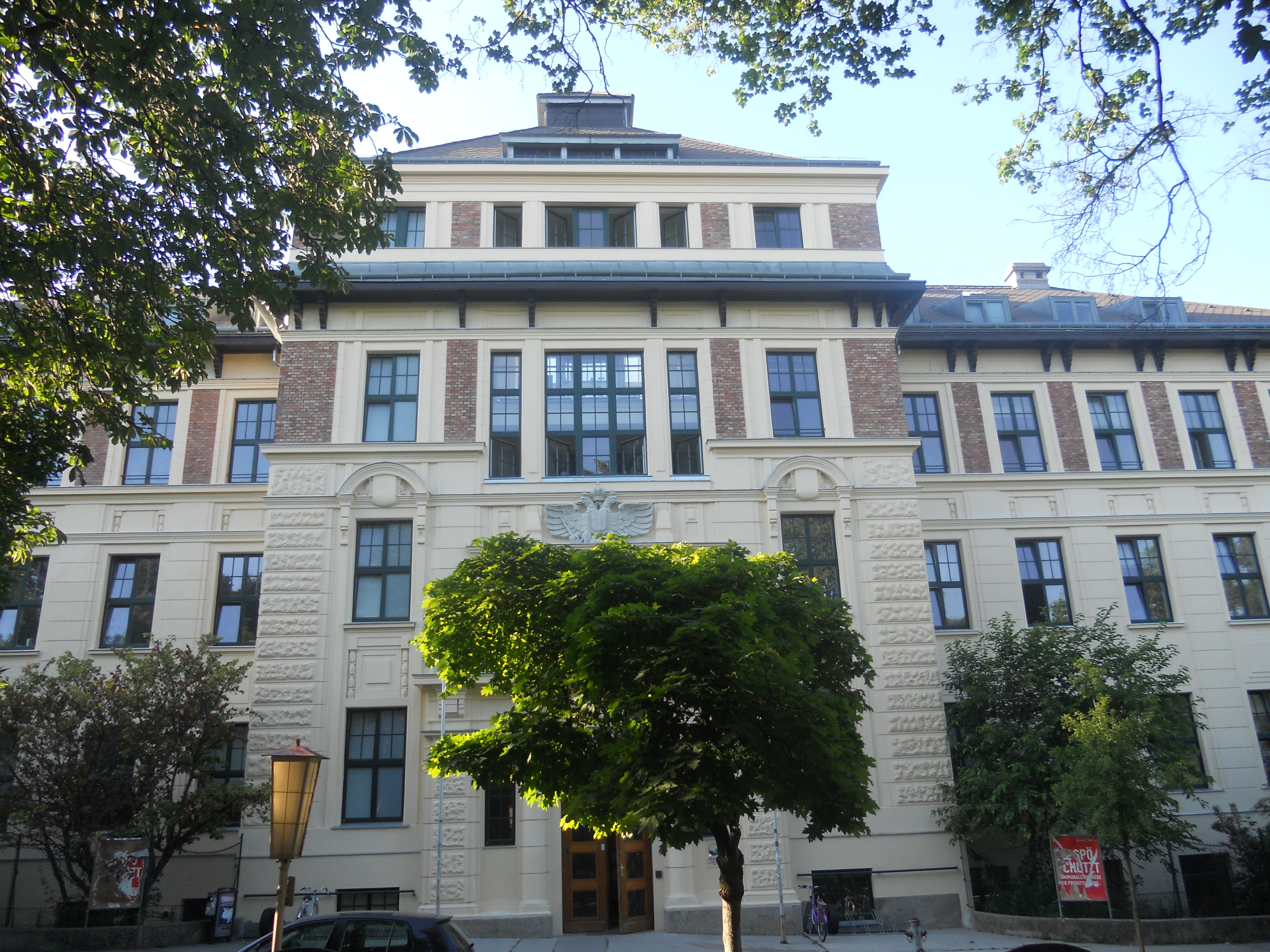 Sog. Guttenberg-Haus der Universität für Bodenkultur, Feistmantelstraße 4